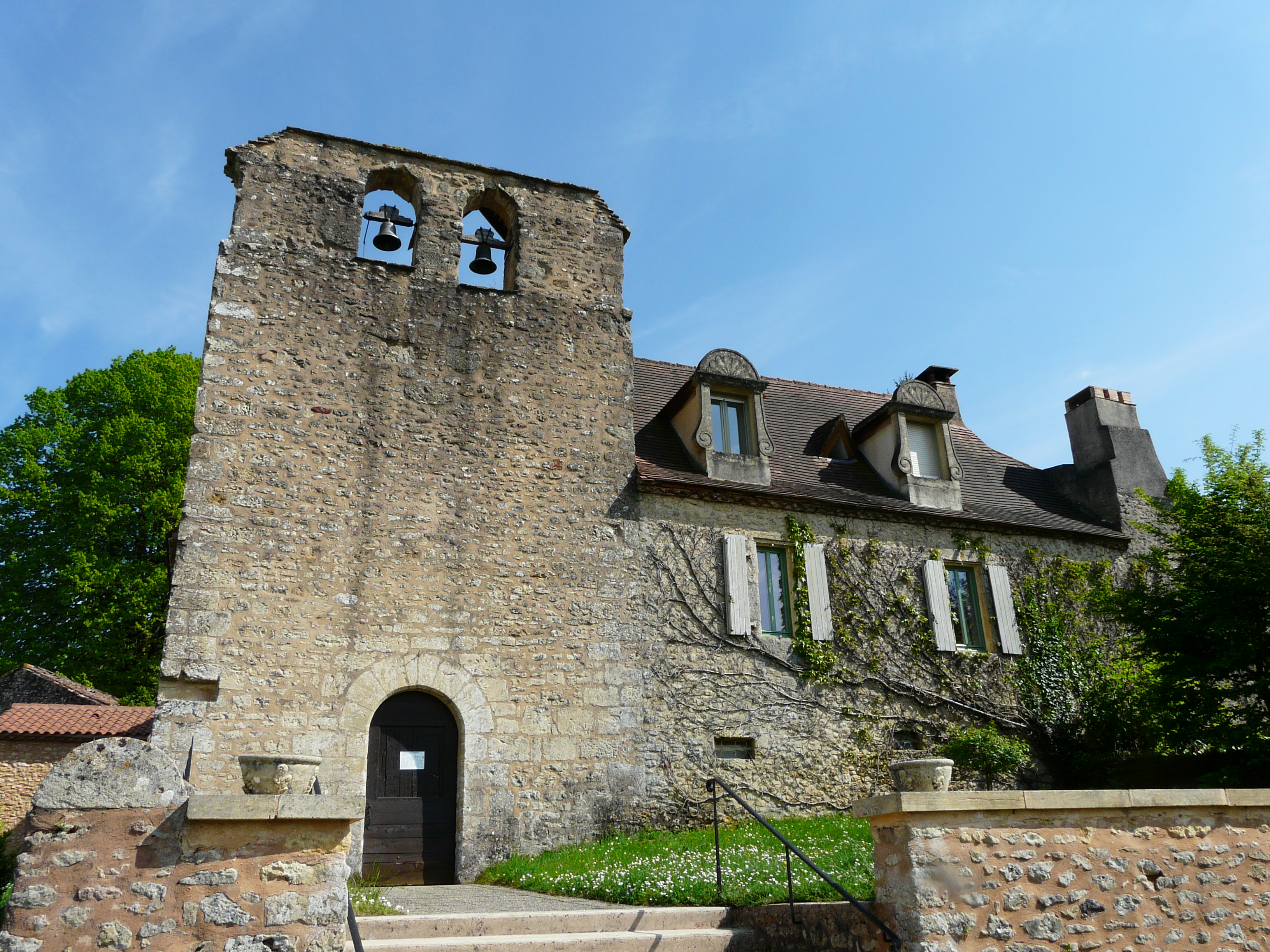 L'église et le presbytère de Monplaisant, Dordogne, France.